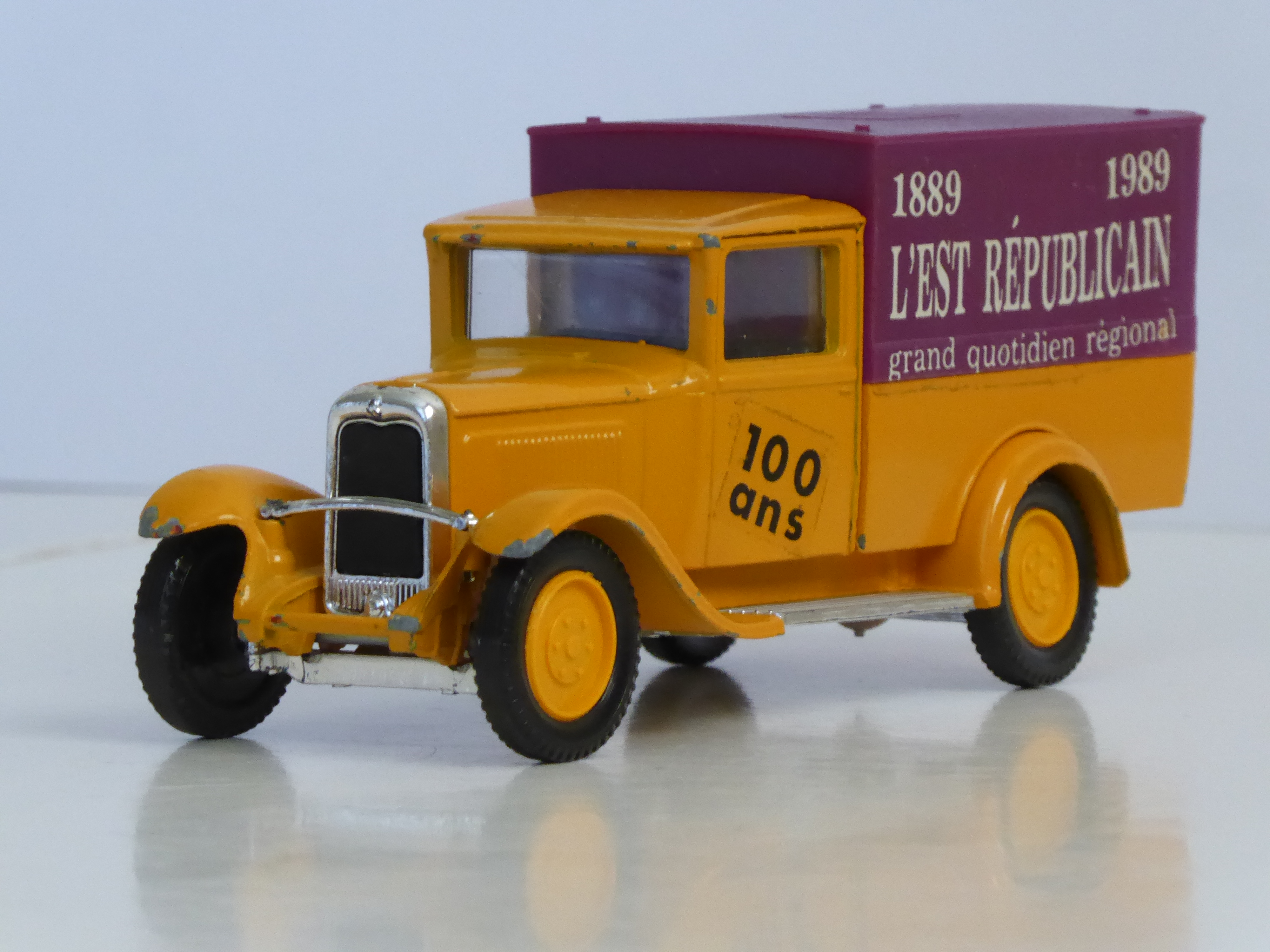 Modèle réduit (1/43) de la camionnette Citroën C4 F de 1930 fabriqué par Solido à l'occasion du centenaire du journal l'Est républicain en 1989 (ce type de camion était utilisé pour la livraison des journaux aux détaillants).